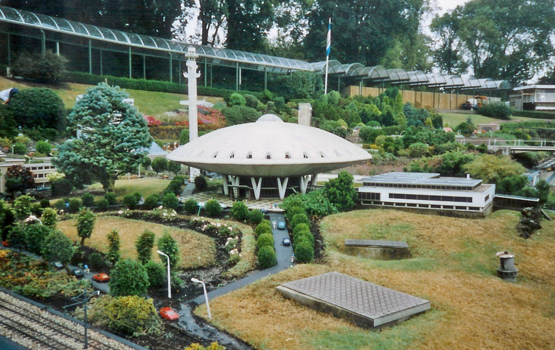 Evoluon-Modell am Madurodam.